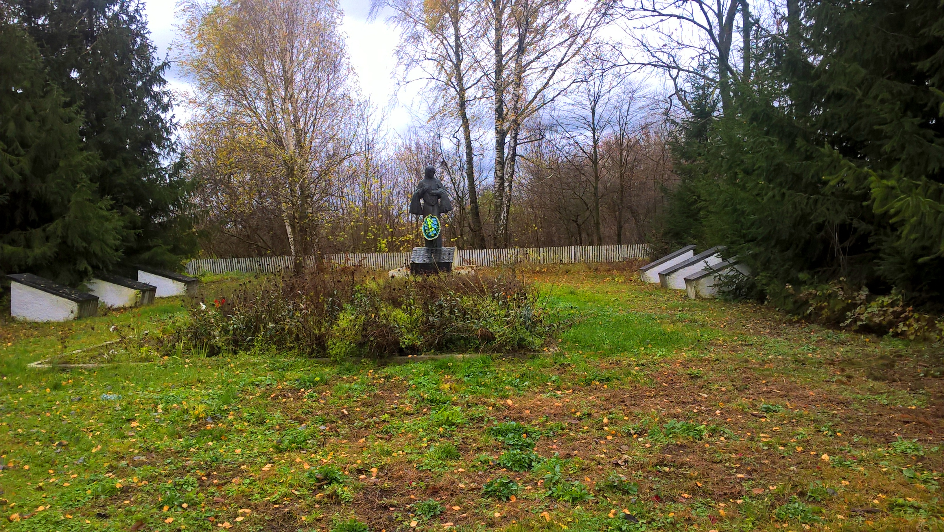 Фото пам'ятника загиблим у Другій Світовій с.Хоняків